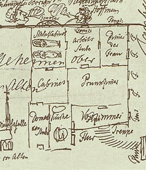 Ausschnitt aus dem Kunzschen Riss, den E. T. A. Hoffmann 1815 an seinen Bamberger Verleger Kunz schickte